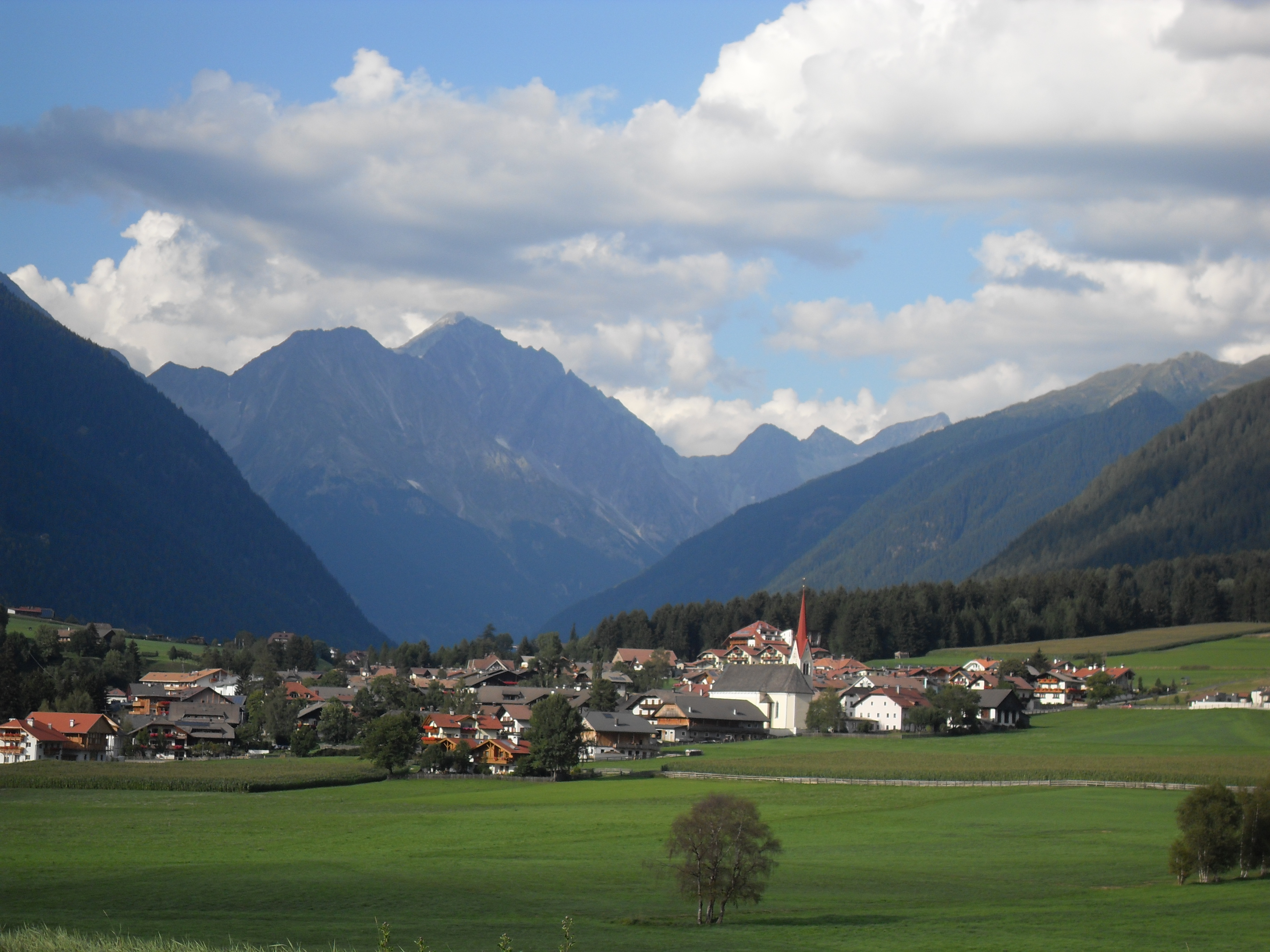 Veduta della frazione Rasun di Sotto (Anterselva)